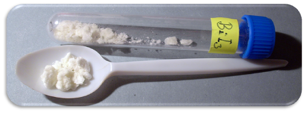 Jodid bismutitý - BiI3